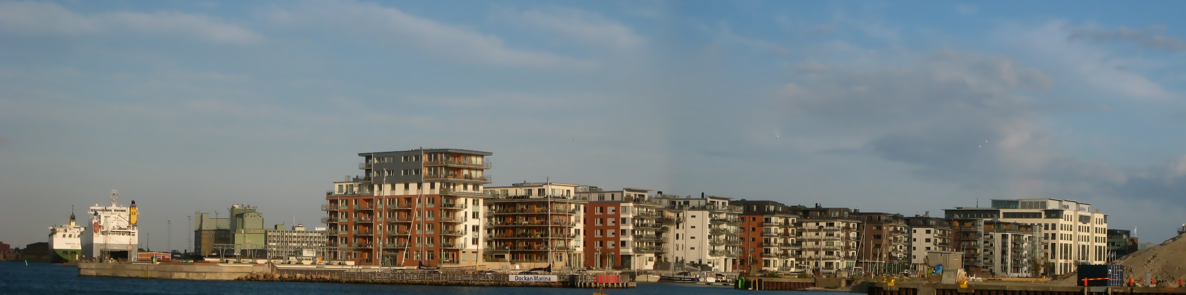 Dockan, nya bostadshus kring Kockums gamla dock i Malmö.